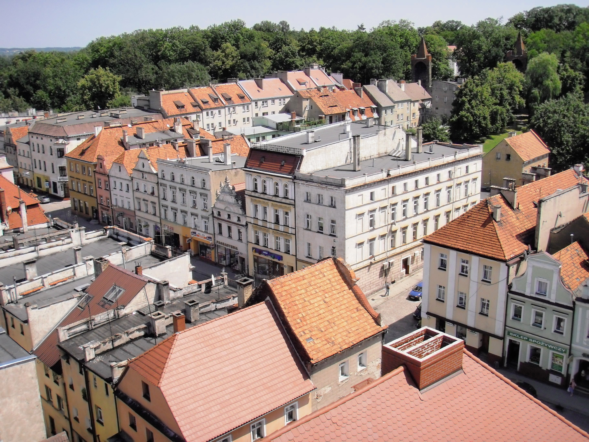 Paczków, Stare Miasto w ramach średniowiecznego założenia